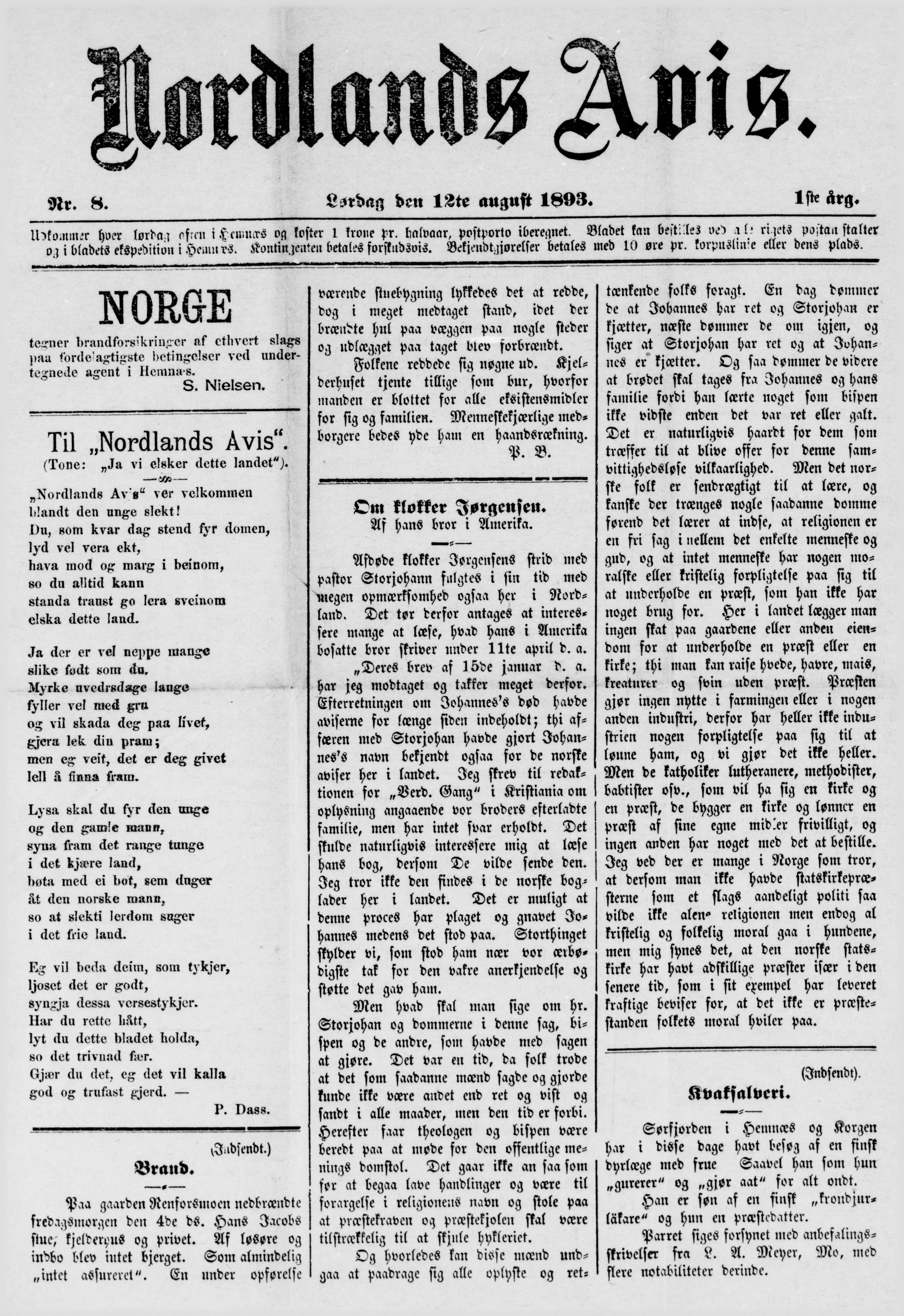 Nordlands Avis ble utgitt på Hemnesberget fra 17. juni 1893